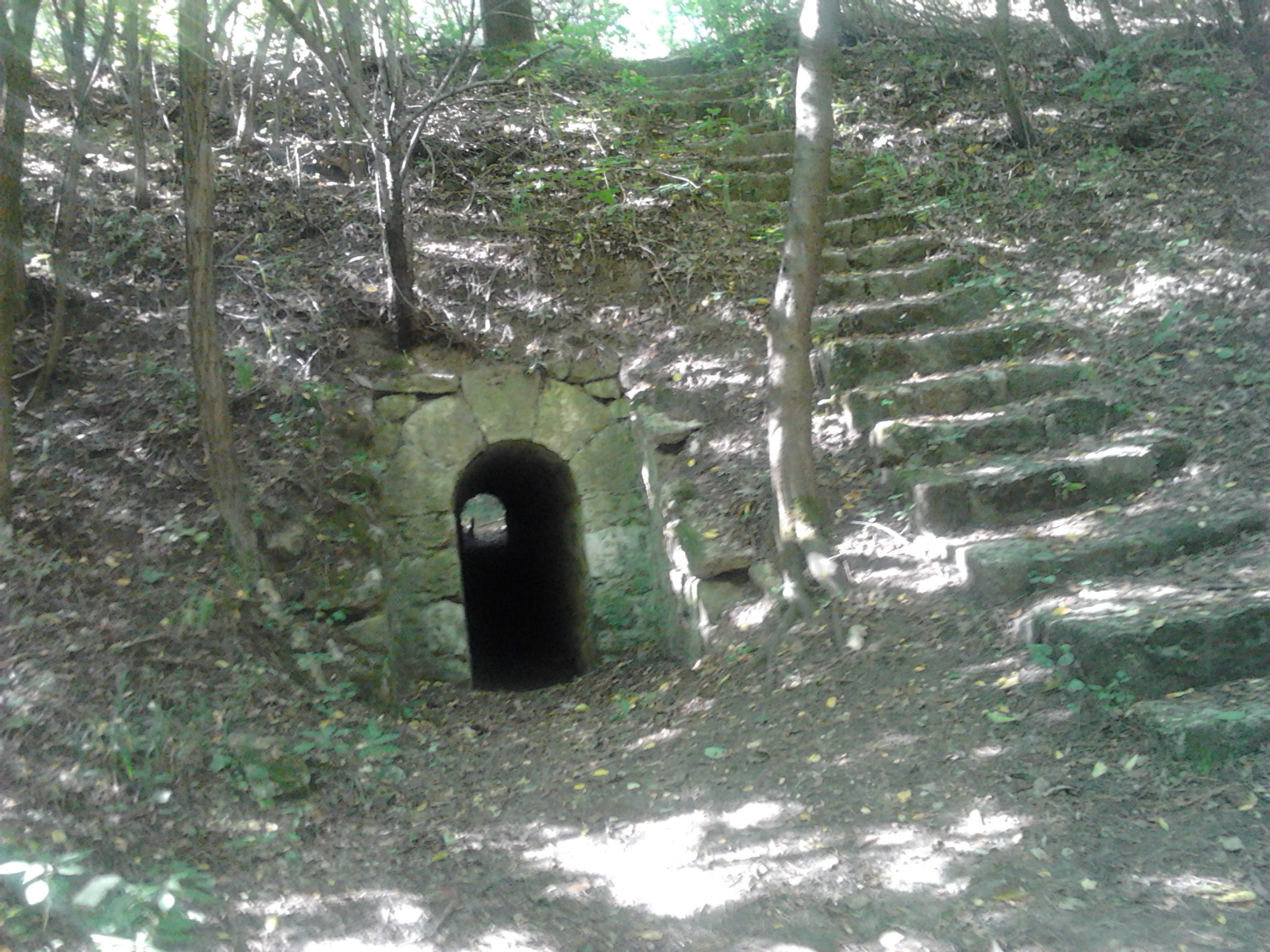 Vízáteresztő az ókorban kőszállításra használt római út alatt.